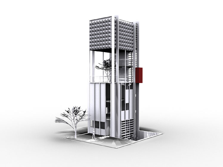 i-rise building model looking from the front